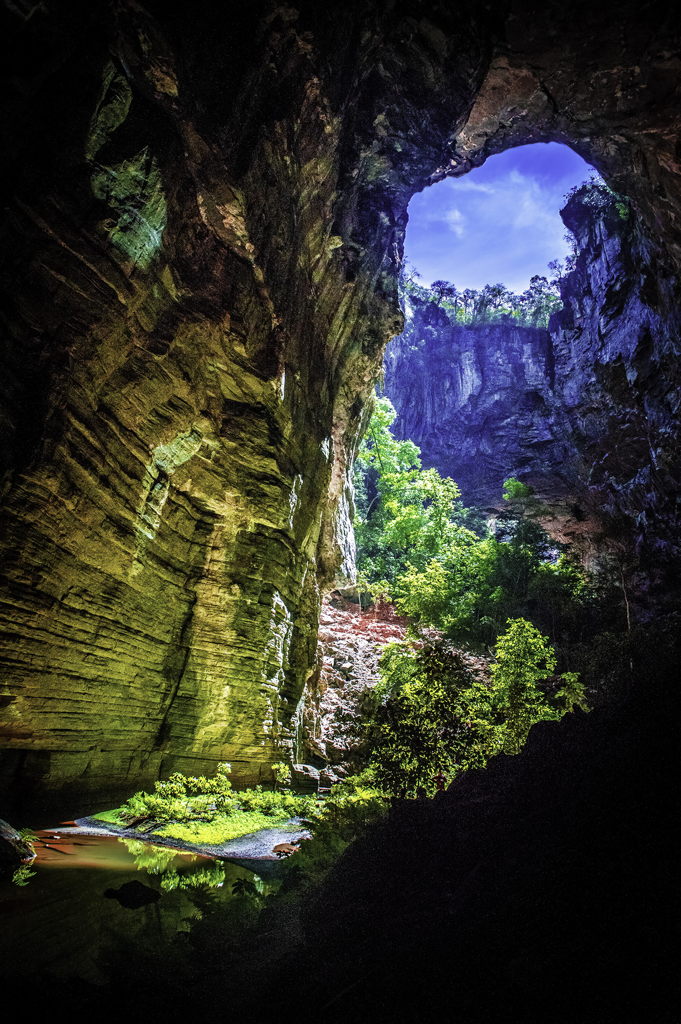 Parque Nacional Cavernas do Peruaçú/Minas Gerais